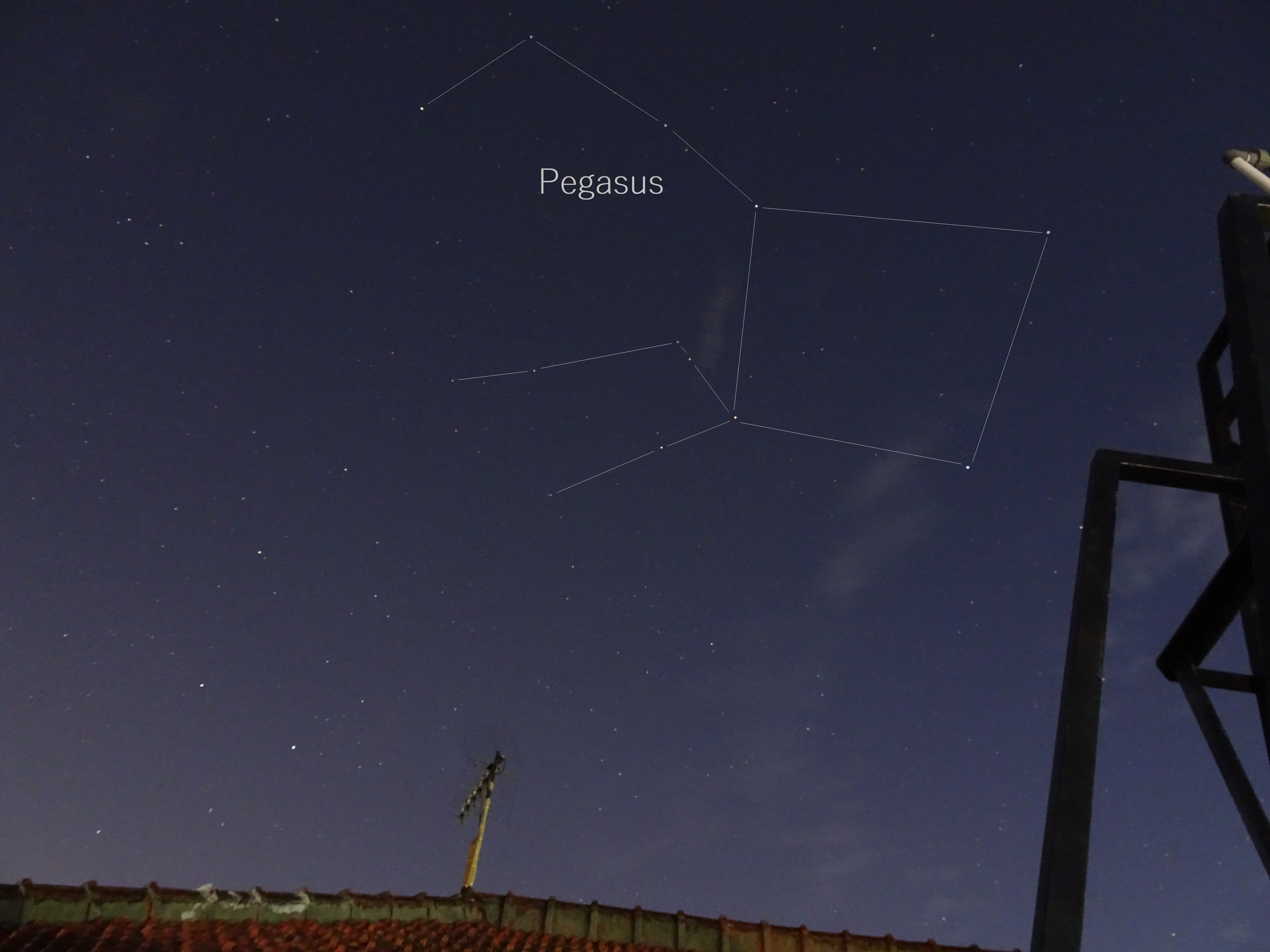 Rasi bintang Pegasus dilihat dengan mata telanjang, Bandung, 15 Juni 2019, 05.17 WIB.